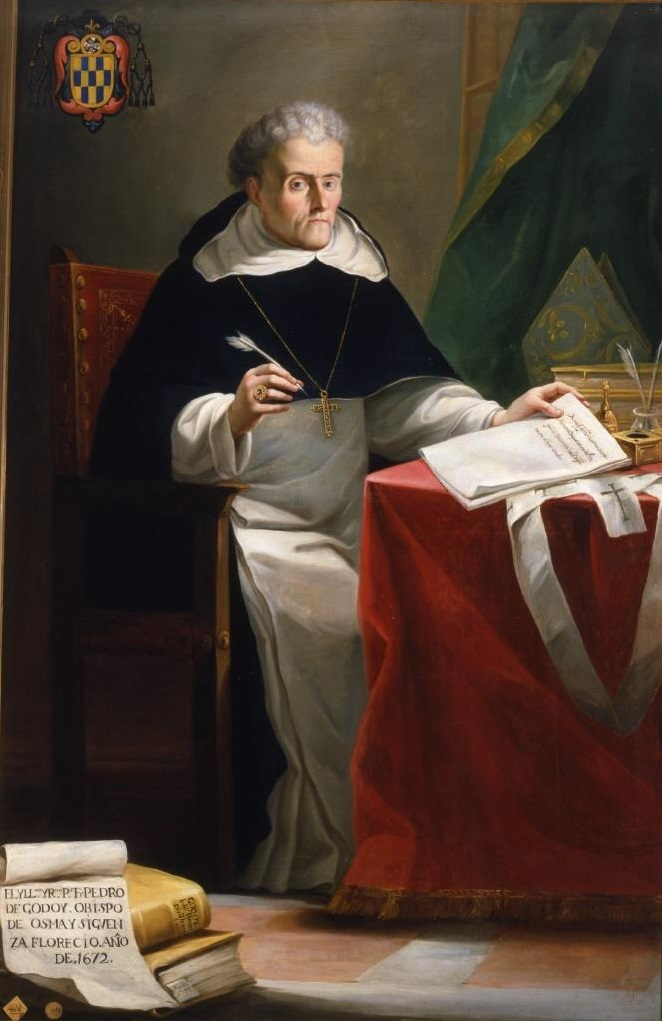 Retrato del eclesiástico español fray Pedro de Godoy (1599-1677), que fue miembro de la Orden de los dominicos y llegó a ser obispo de Osma (1663-1672) y también de Sigüenza (1672-1677).